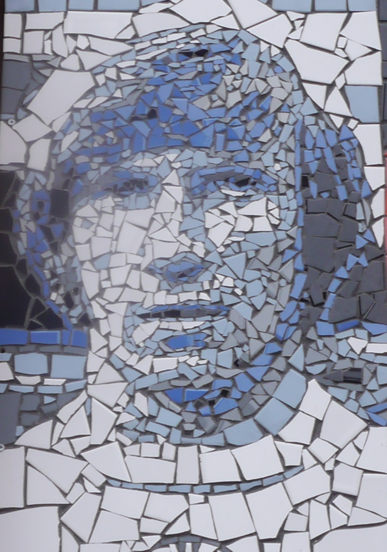 Représentation en carrelage de Colin Bell située à Manchester.